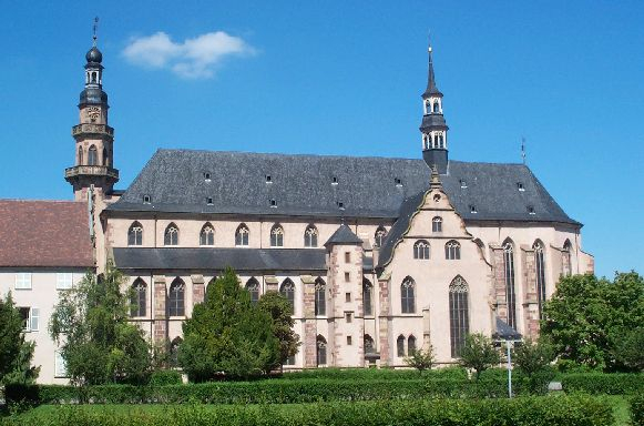 Eglise des Jésuites de Molsheim. Aujourd'hui le premier plan a changé : il n'y a plus de verdure mais des parkings.